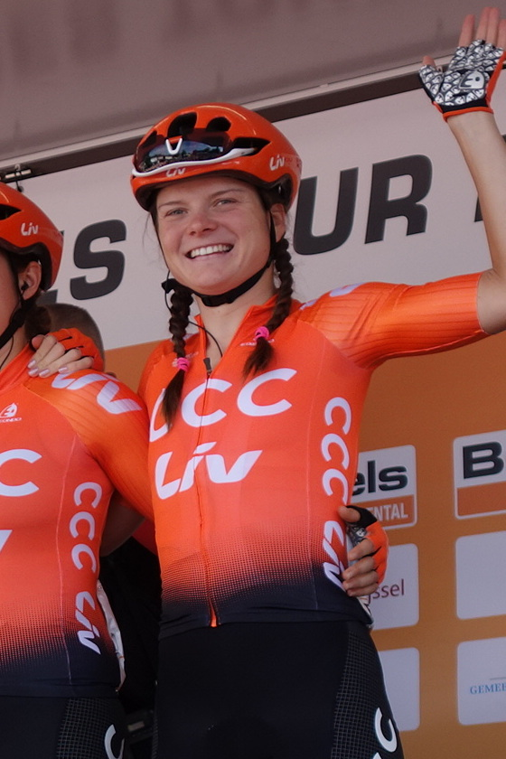 Marta Lach (CCC-Liv) bij de start van de eerste etappe van Stramproy naar Weert in de Boels Ladies Tour 2019